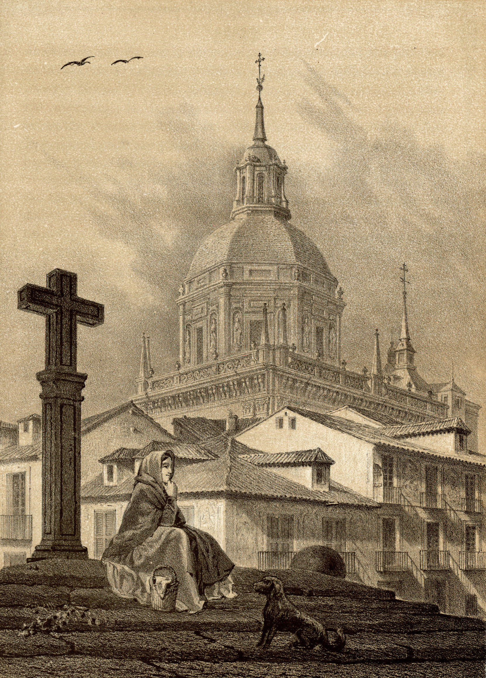 Exterior de la capilla de San Isidro en la parroquia de San Andrés. Cruz de Puerta de Moros. Madrid.